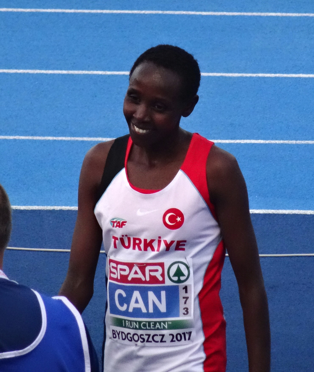 Młodzieżowe Mistrzostwa Europy w Lekkoatletyce U23 w Bydgoszczy 13-16 lipca 2017, finał biegu na 10000 m kobiet